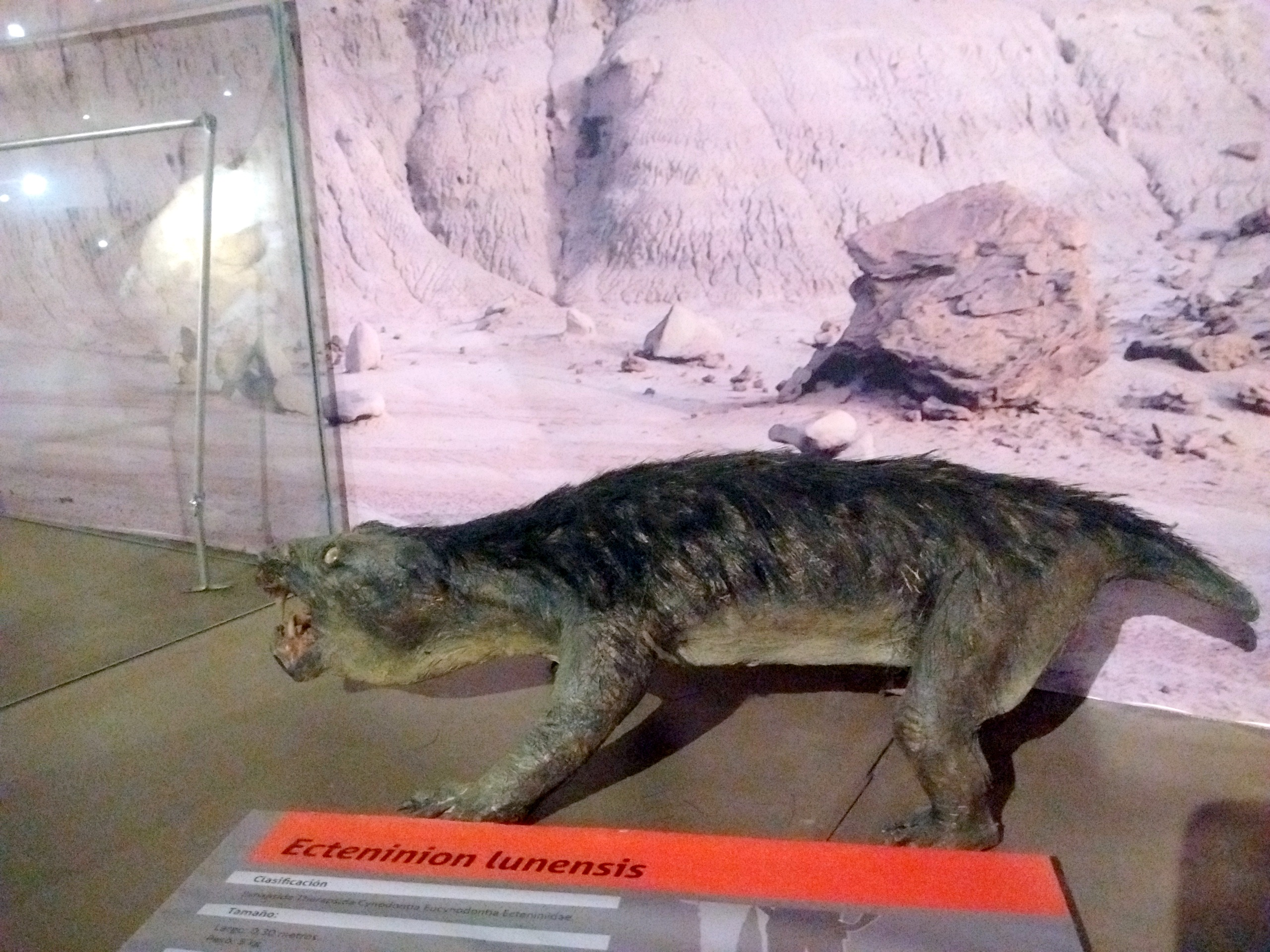 Recreación paleoartística del animal